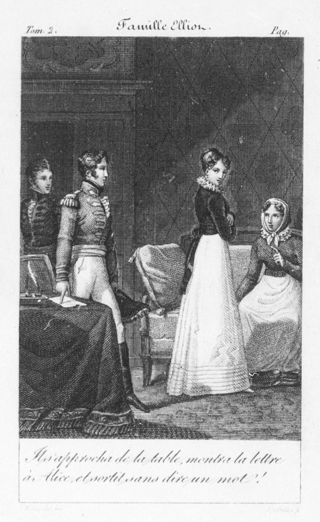 Frontispice du livre : La Famille Elliot de Jane Austen tome 2 1828 - Paris - Arthus Bertrand